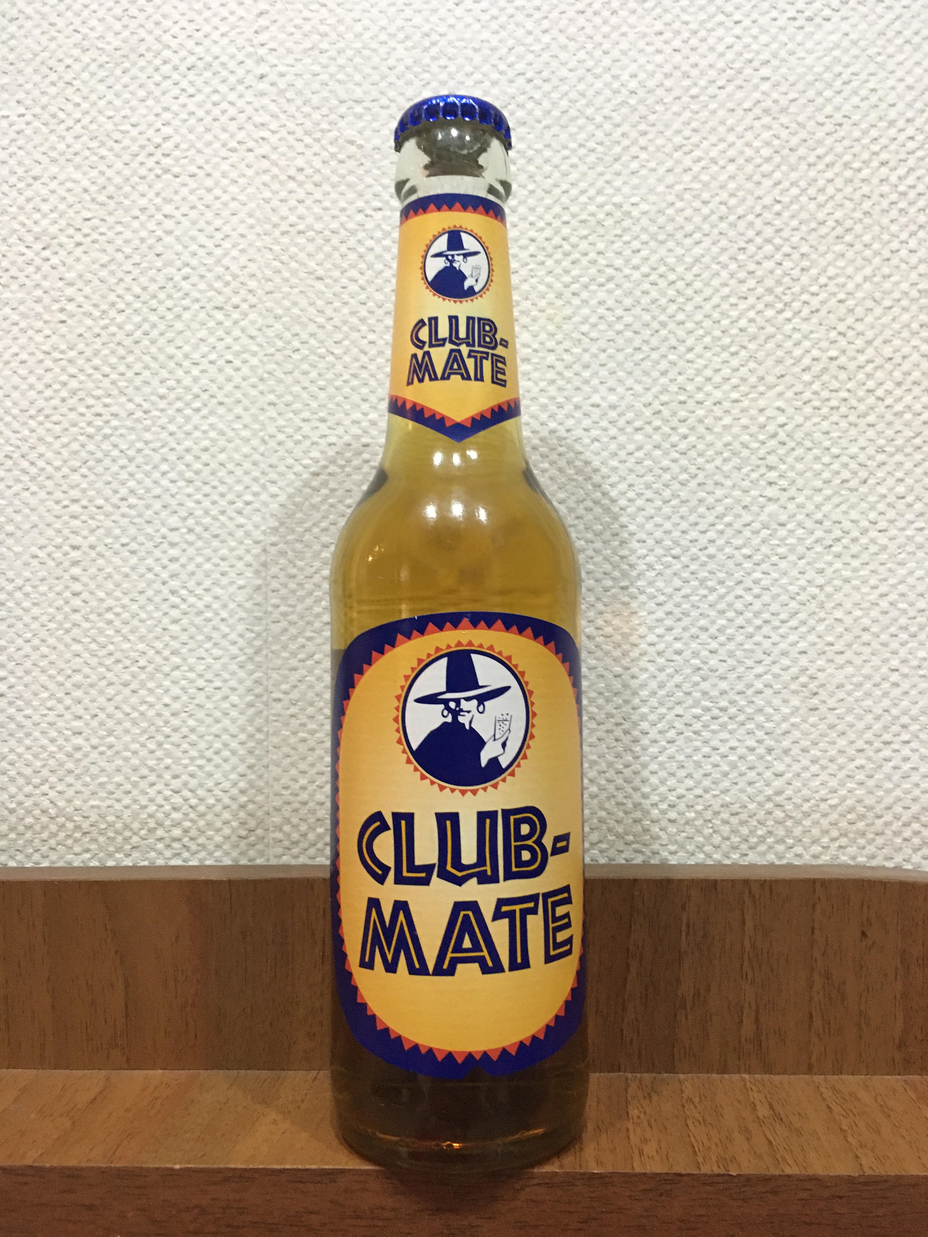 Фотографія пляшки напою club mate